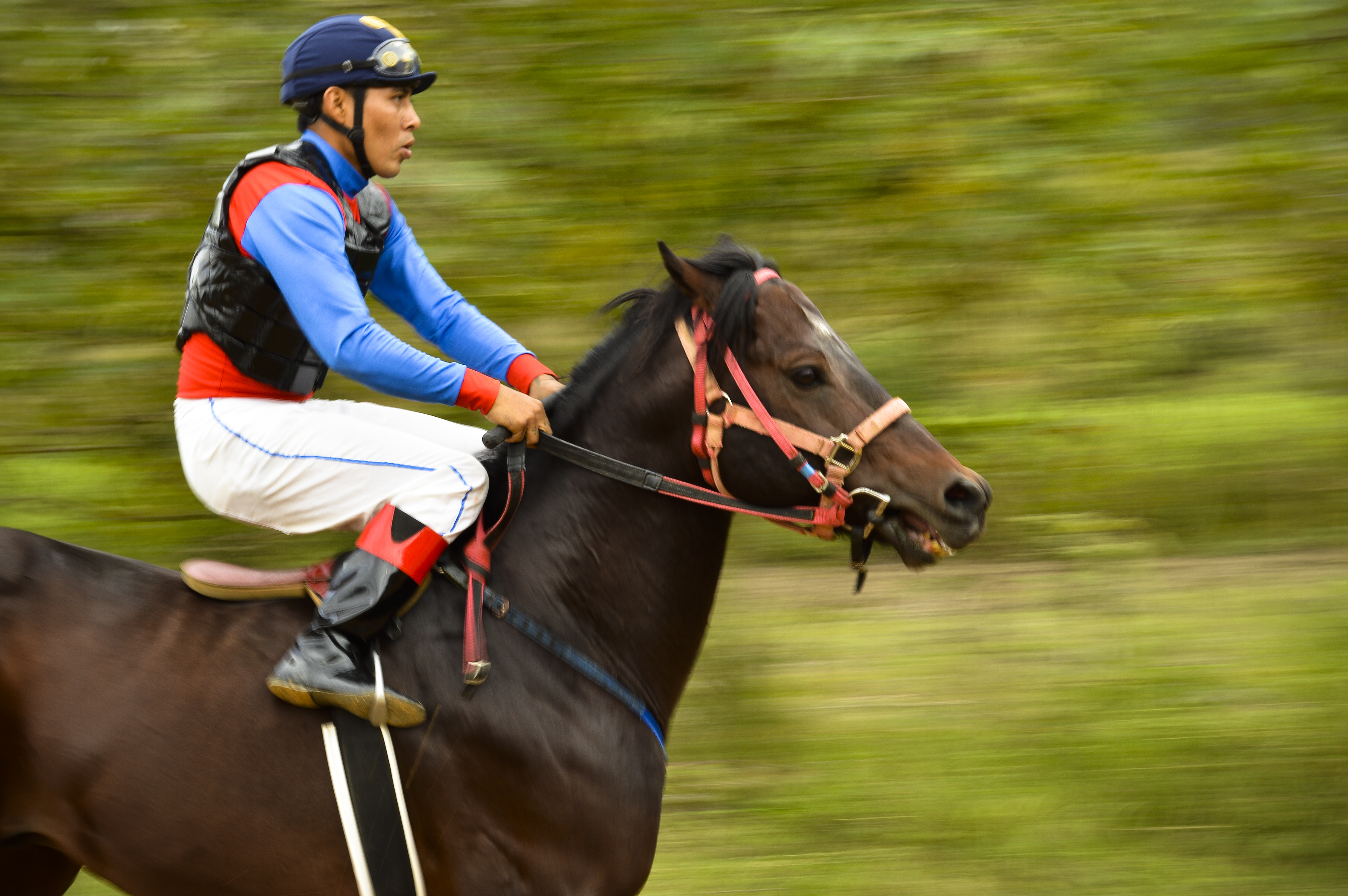 Carrera de Caballo que se realizo en la comunidad de San Agustín de las Juntas, por las festividades de su santo patrono.